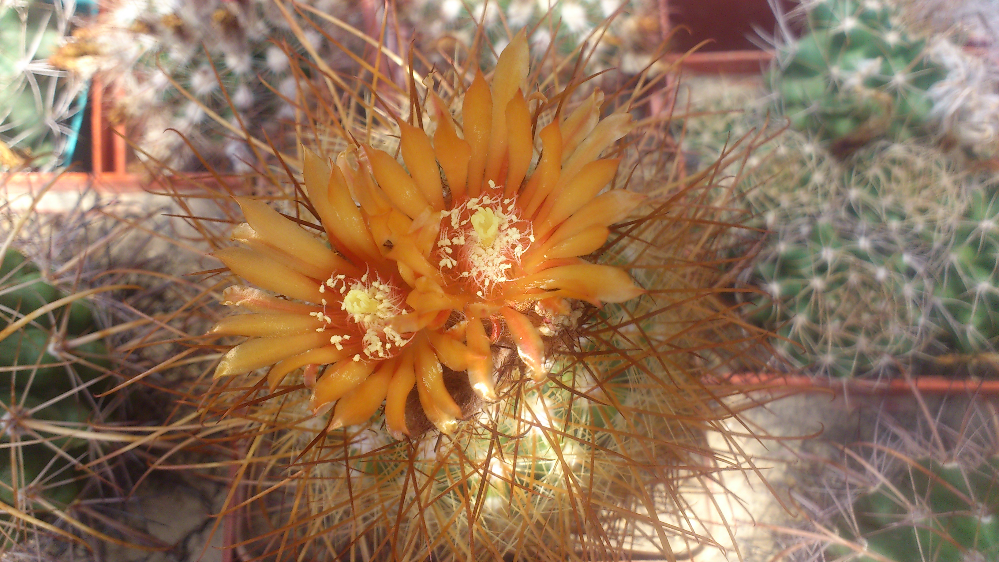 Квітуча Parodia aureicentra з з колекції Юрія Шостака, Миколаїв